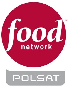 Logo byłego kanału telewizyjnego Polsat Food Network